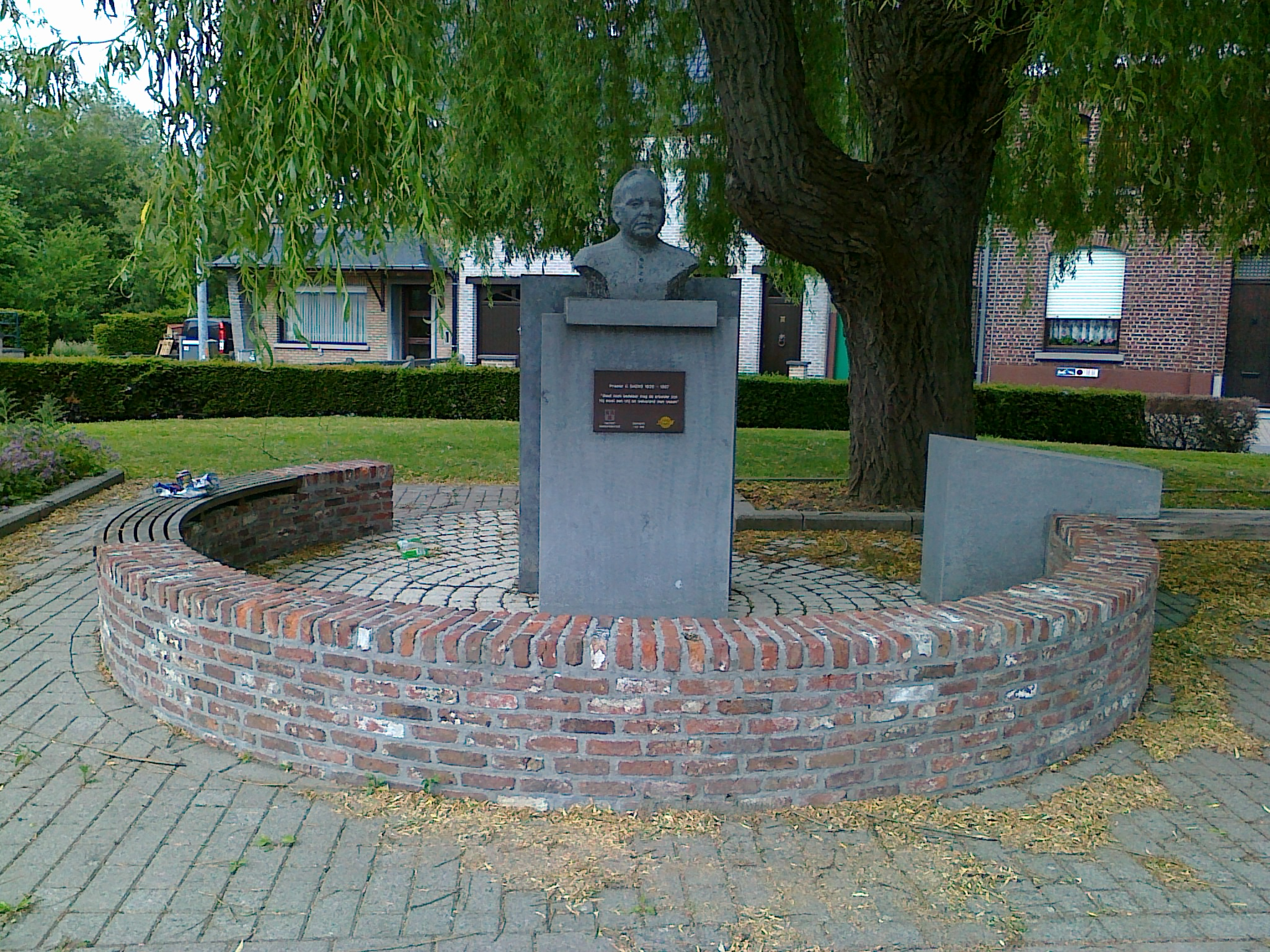 Standbeeld van Priester Daens te Ede in Oost-Vlaanderen